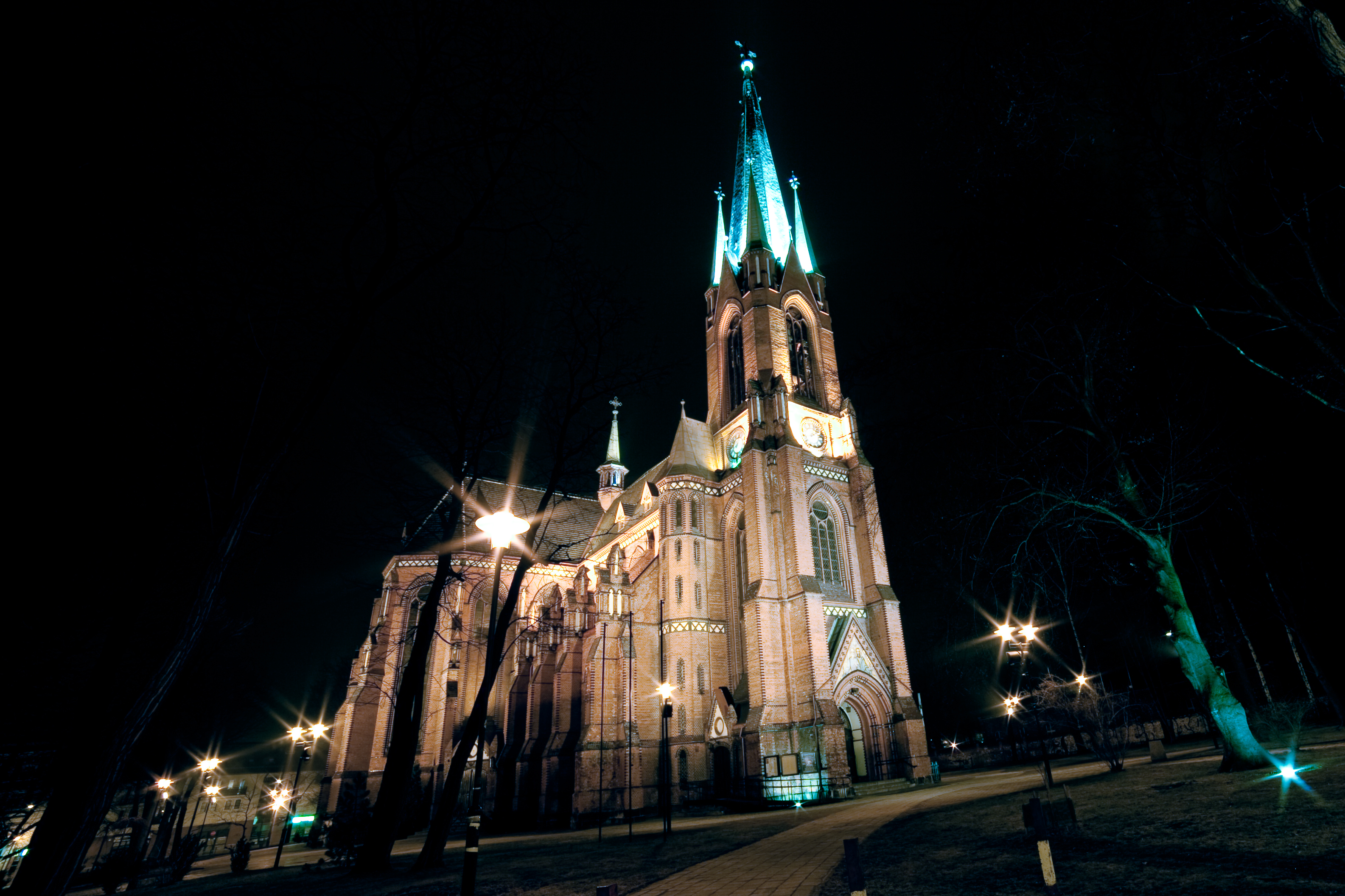 Gliwice, oświetlenie katedry nocą